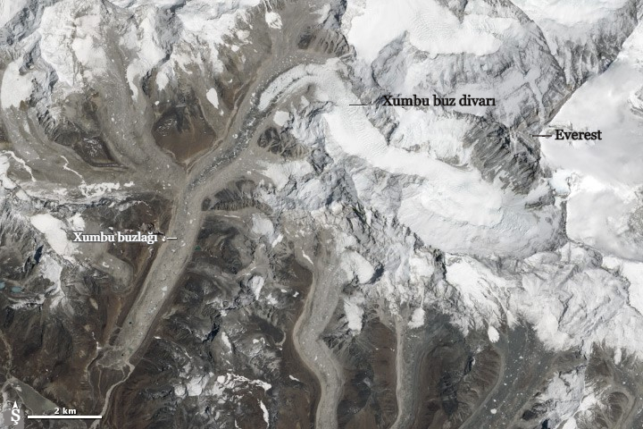 Xumbu buzlağı və Xumbu buz divarı